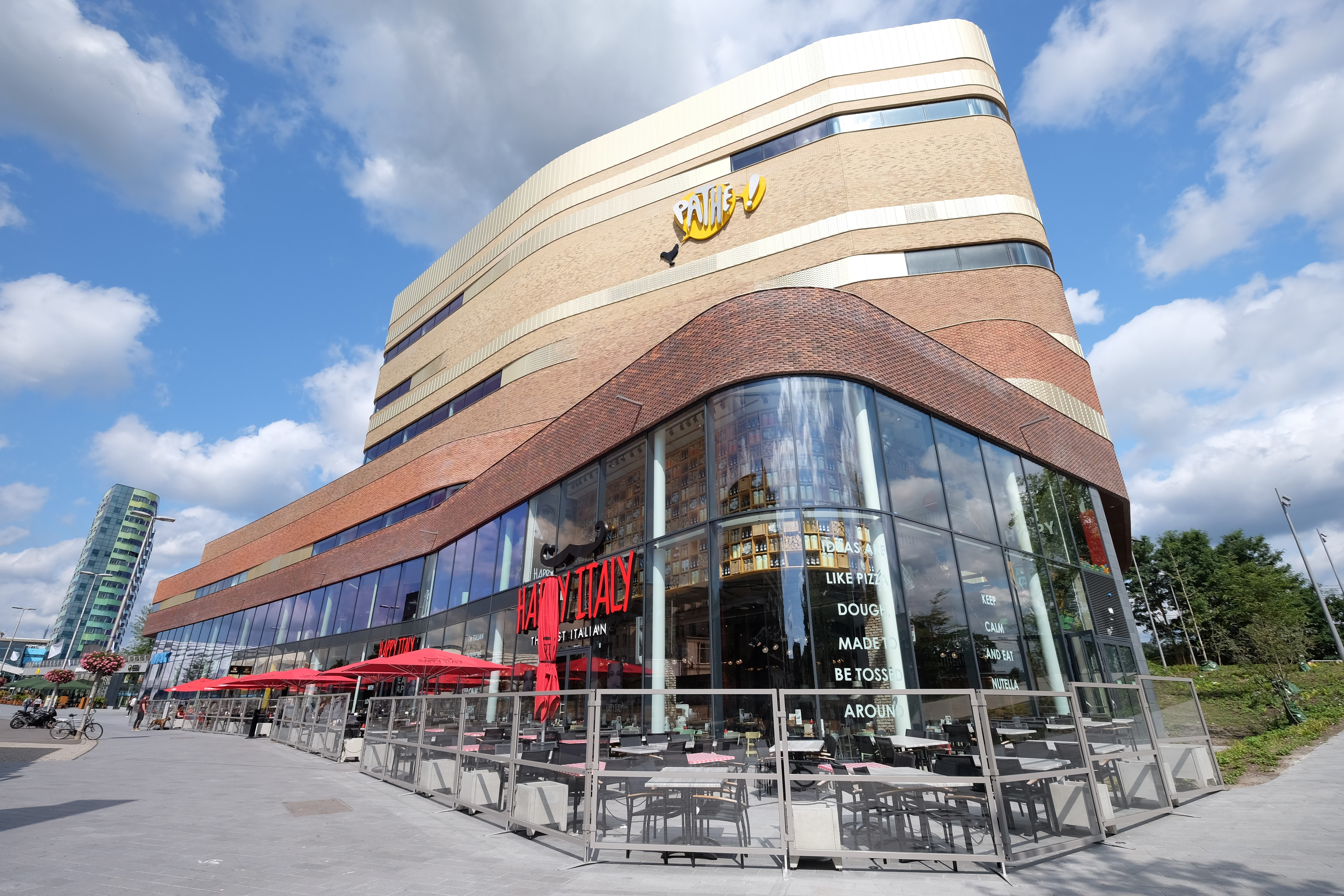 Stationsplein, Arnhem, Netherlands